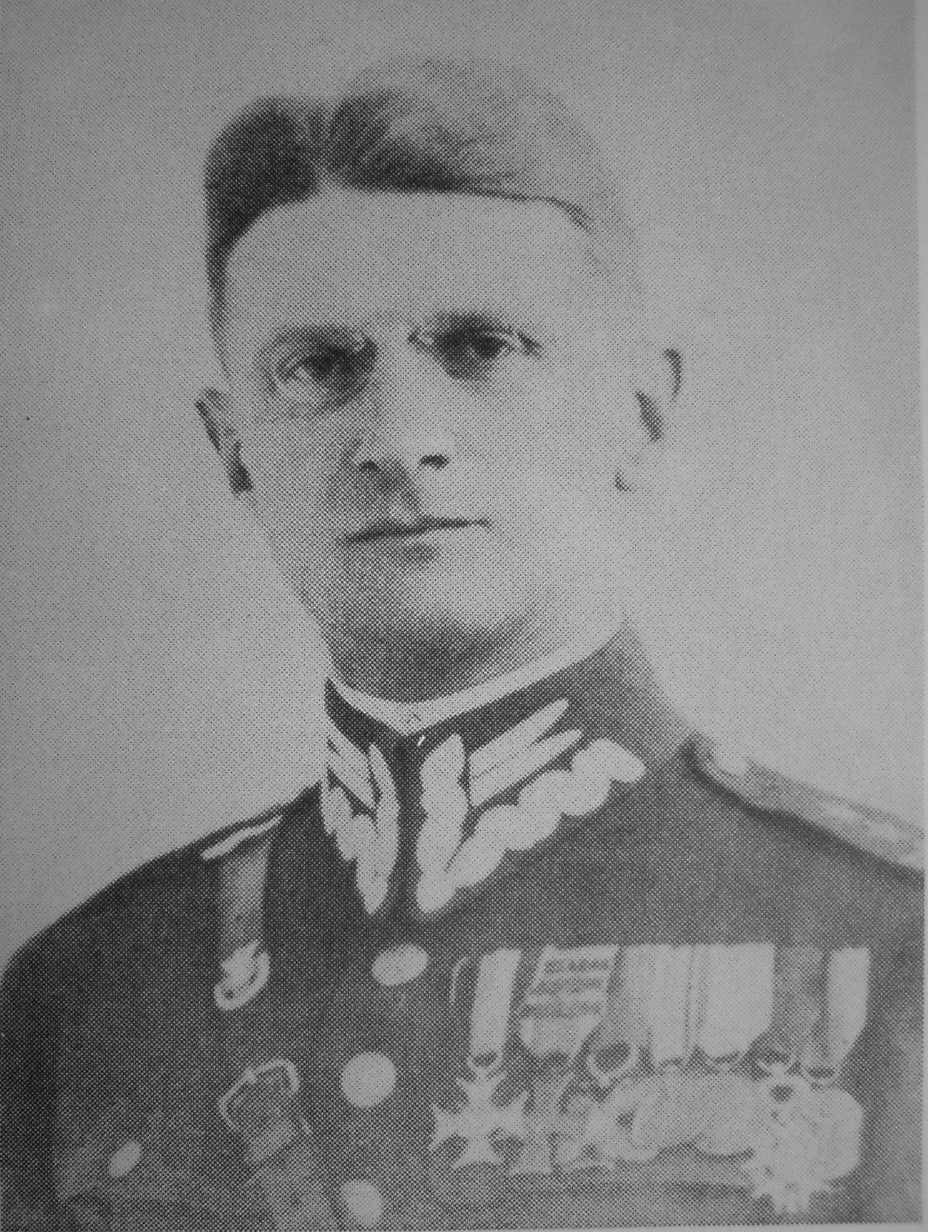 Witold Mikulicz-Radecki jako ppłk. dypl. 2 Pułku Szwoleżerów Rokitniańskich